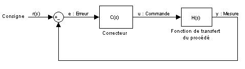 Schéma type d'une boucle de régulation avec un correcteur (en anglais : controller)